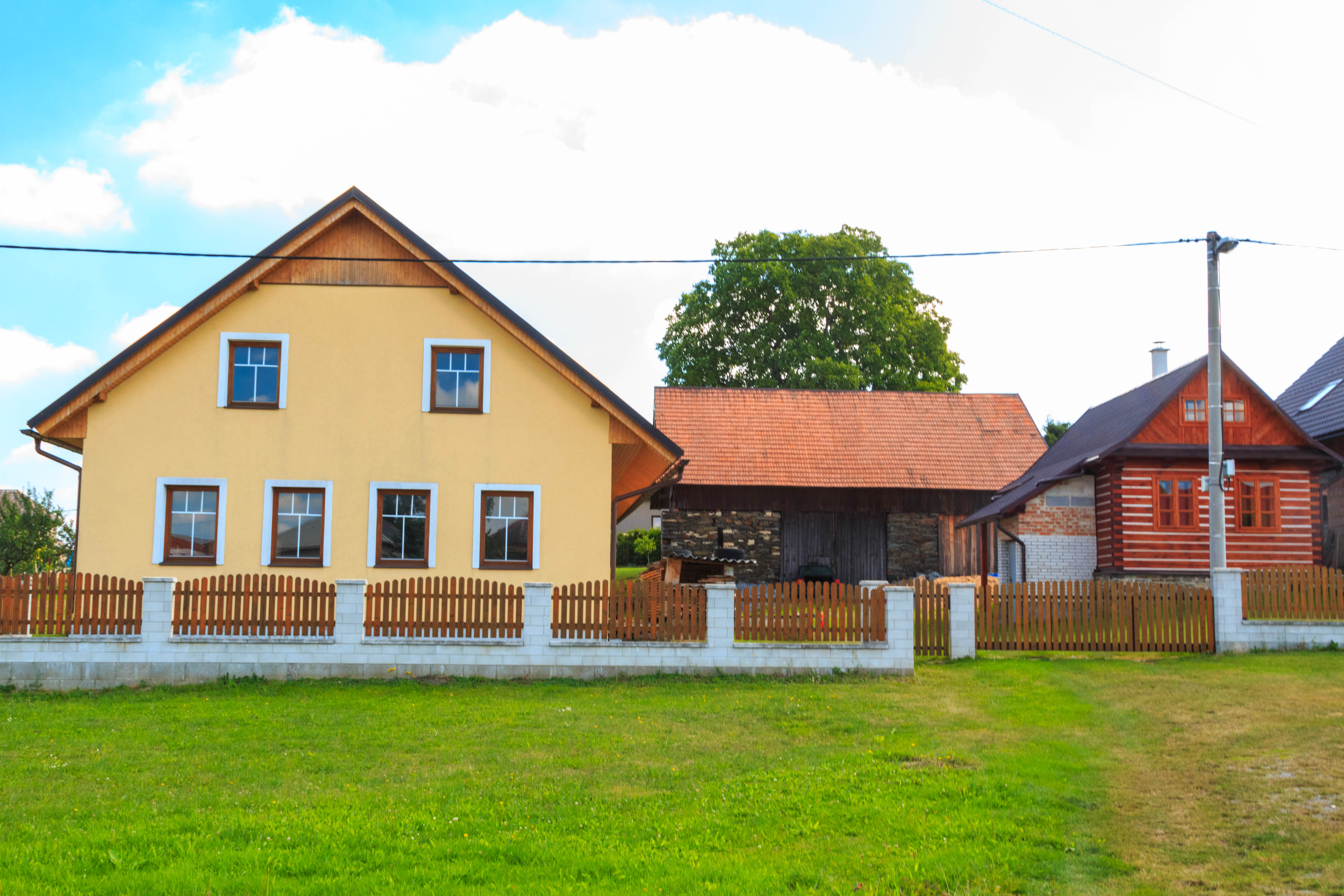 Pokřikov - čp. 5